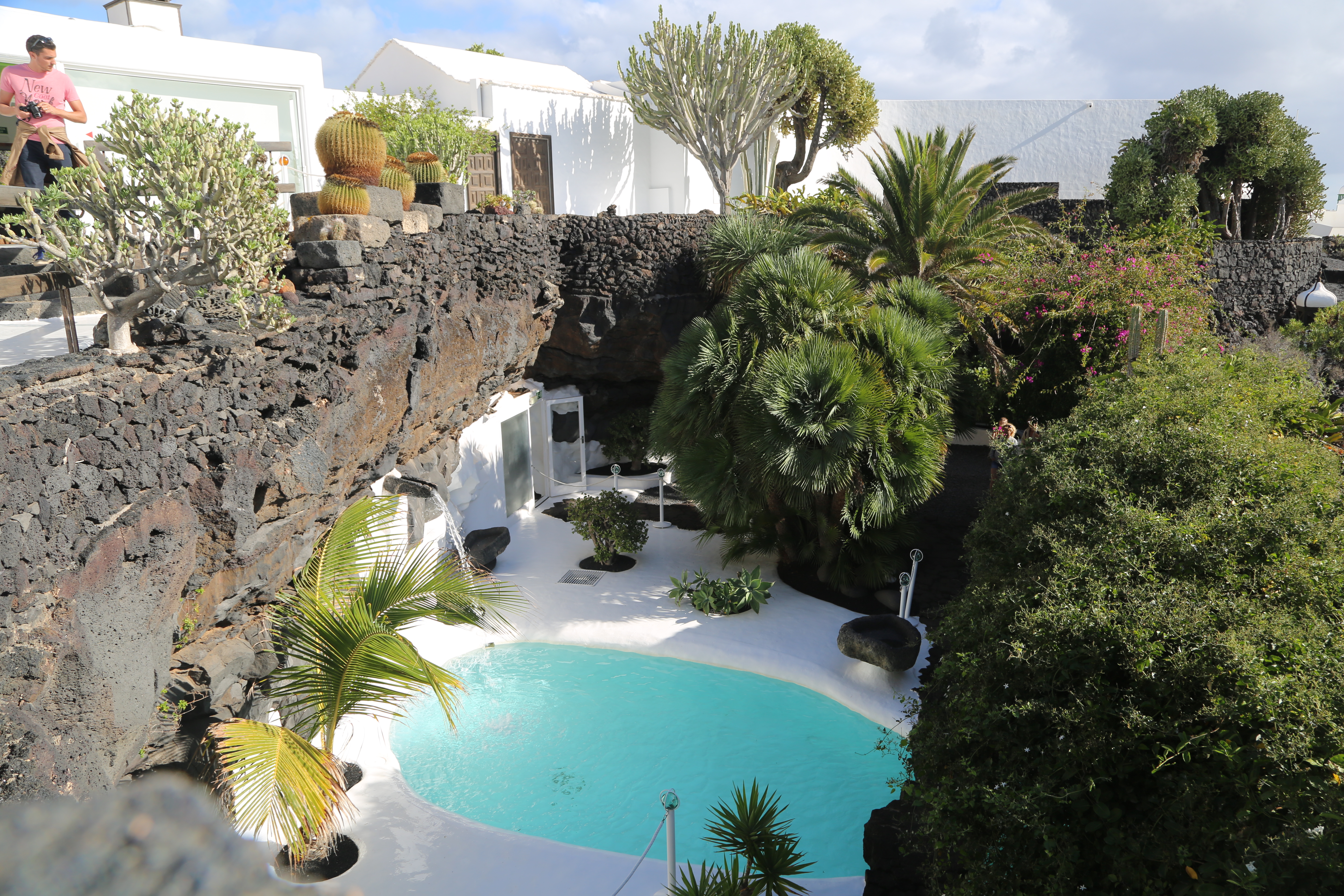 César Manrique's eigen huis, onder de grond gebouwd, in Tahíche.